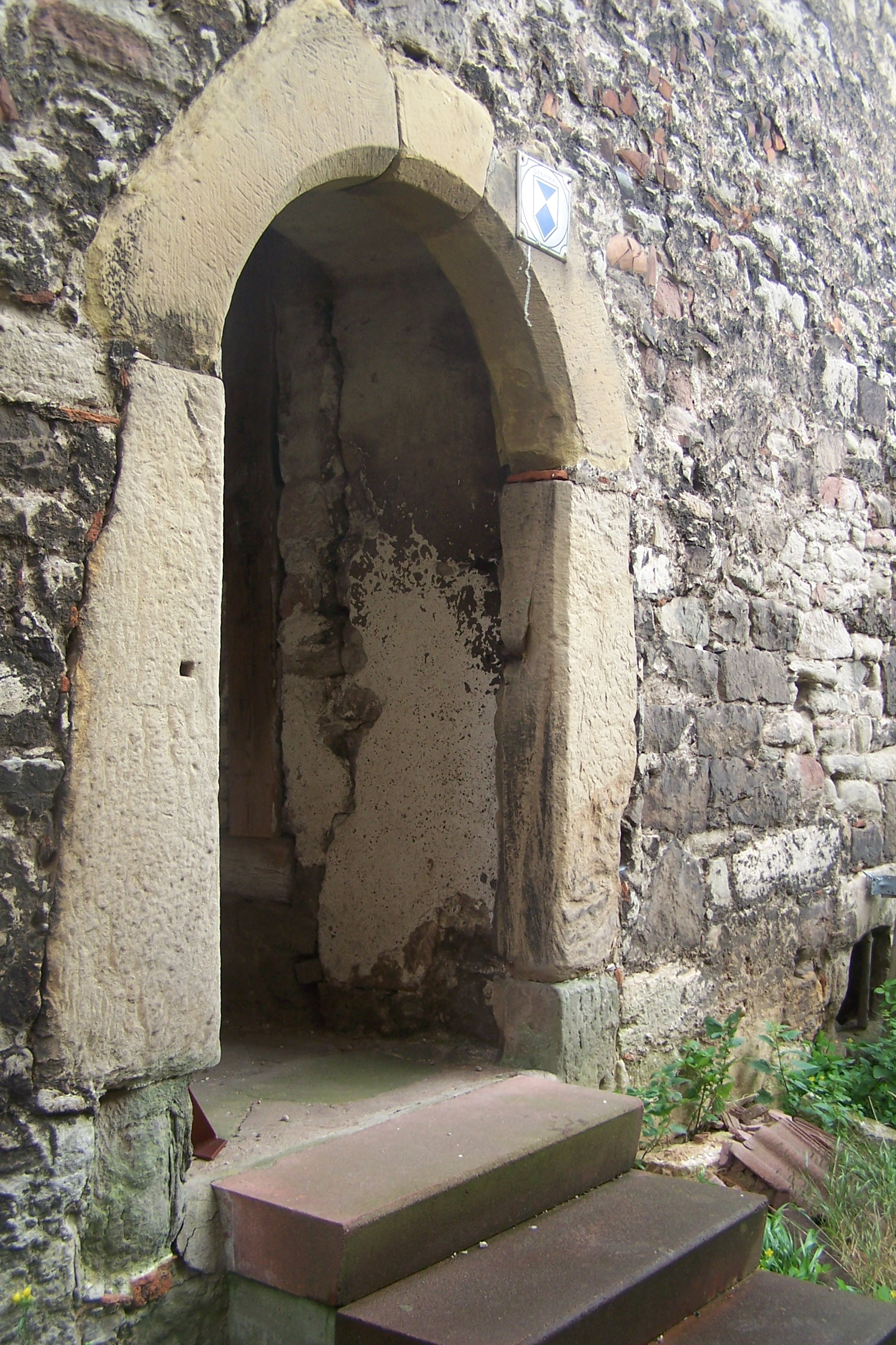 GTH Mechterstädt, Pforte auf der Ostseite